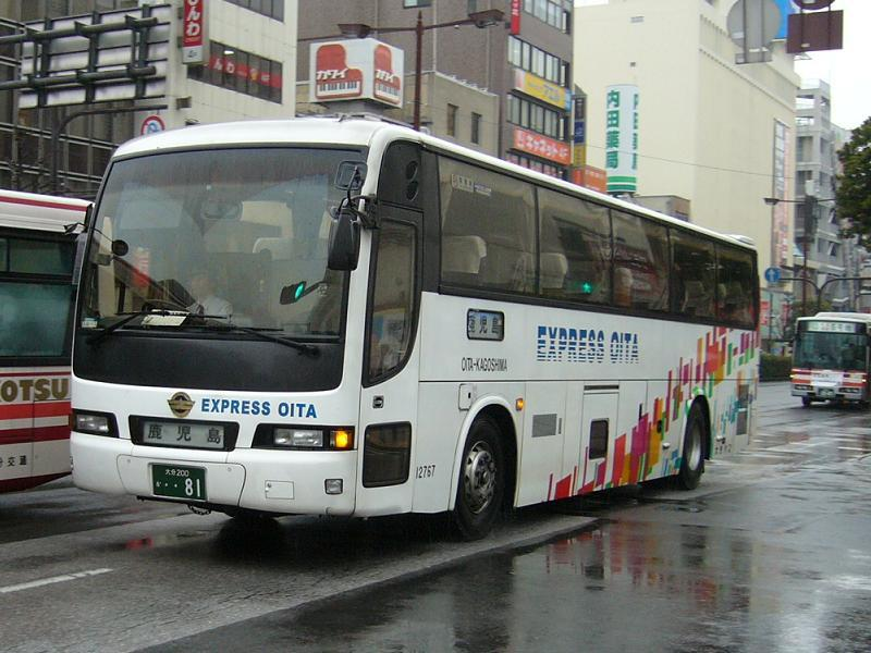 登録番号 大分200か・・81 大分バス所属 車番12767 トロピカル号（大分線）用 2006年1月14日 大分トキハ前にて撮影